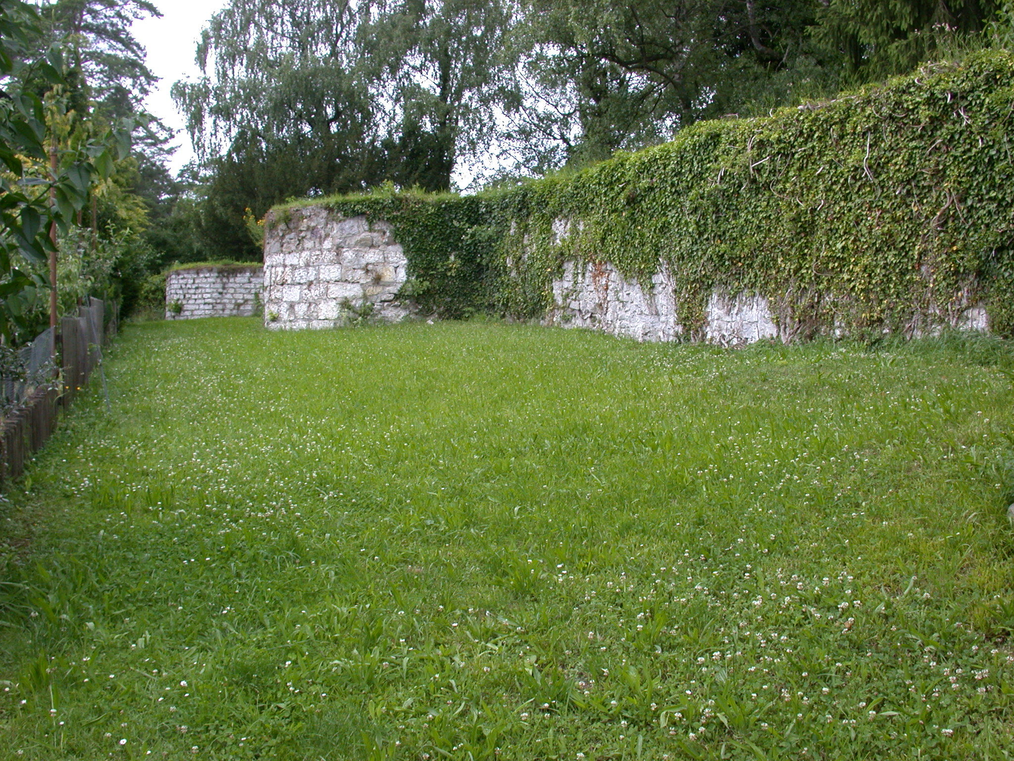 Spätantikes Kastell Tasgetium, Rest der Südmauer, Stein am Rhein – SH – Schweiz.